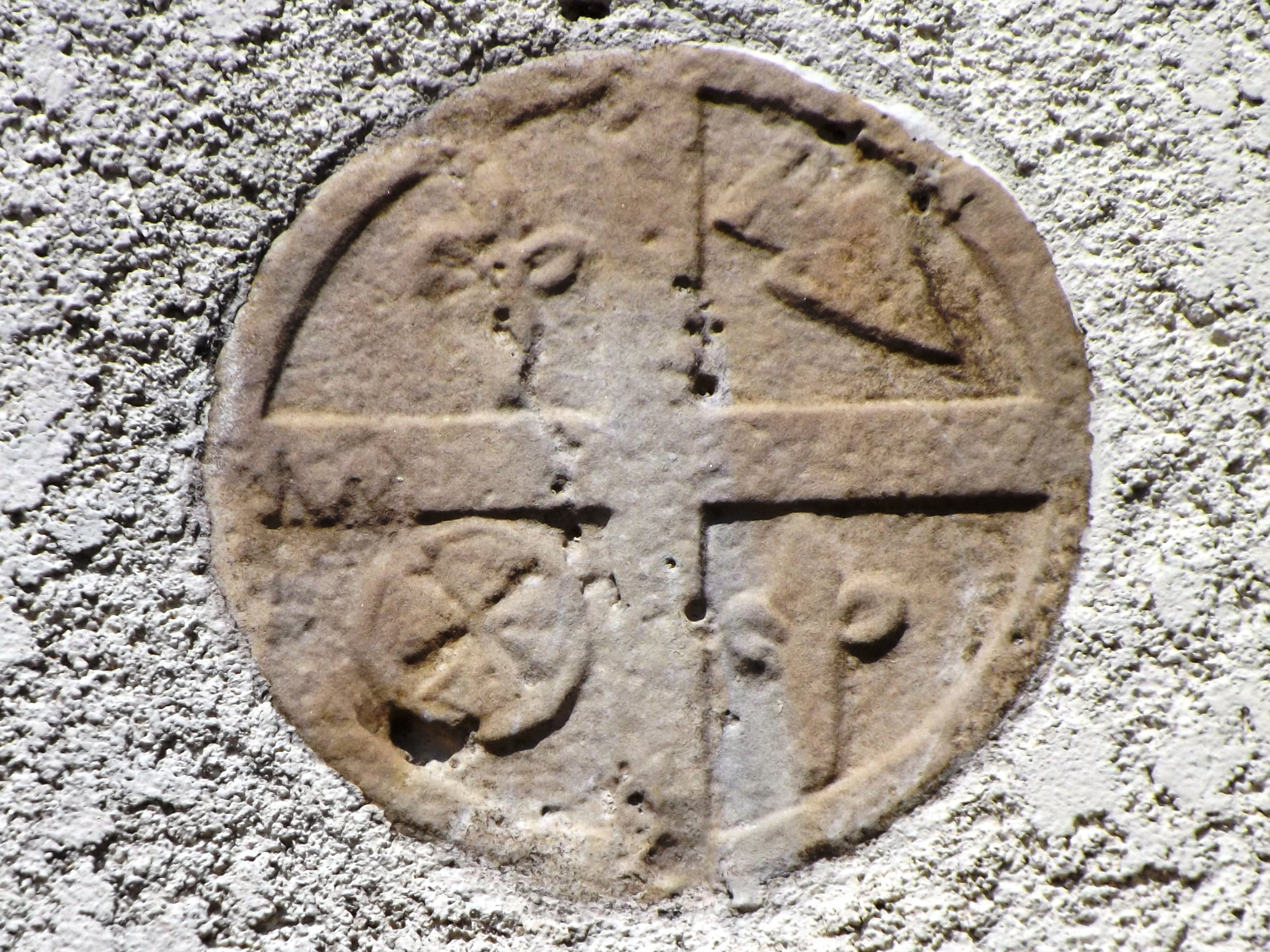 Stèle discoïdale scellée sur la façade de l'église de Puyol-Cazalet, Landes, France